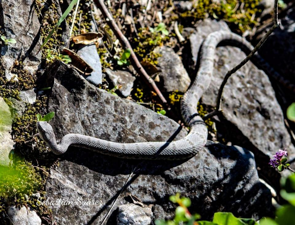 Víbora de cascabel en rocas